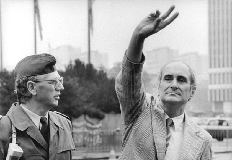 ADN- Grimm 8.6.90 Berlin: Mahnwache- Der Rektor der Humboldt-Universität Berlin, der Theologe Prof. Dr. Heinrich Fink (r), versicherte den Studenten bei ihrer Mahnwache vor dem Berliner Dom seine Unterstützung und forderte sie auf, die Sicherheitspartnerschaft mit der Polizei einzuhalten. Durch weiträumige Absperrungen vor der Volkskammer durch ein starkes Polizeiaufgebot war eine gespannte Situation entstanden.